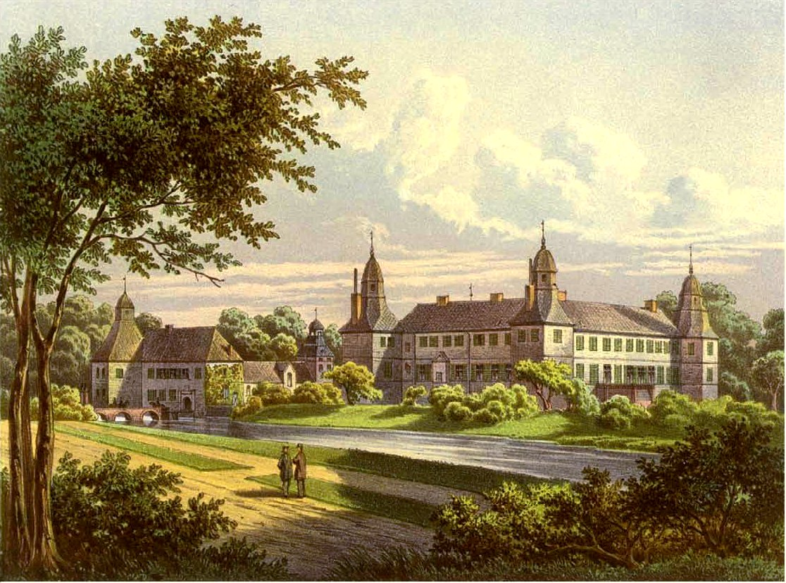 Schloss Westerwinkel, Kreis Lüdinghausen, Provinz Westphalen